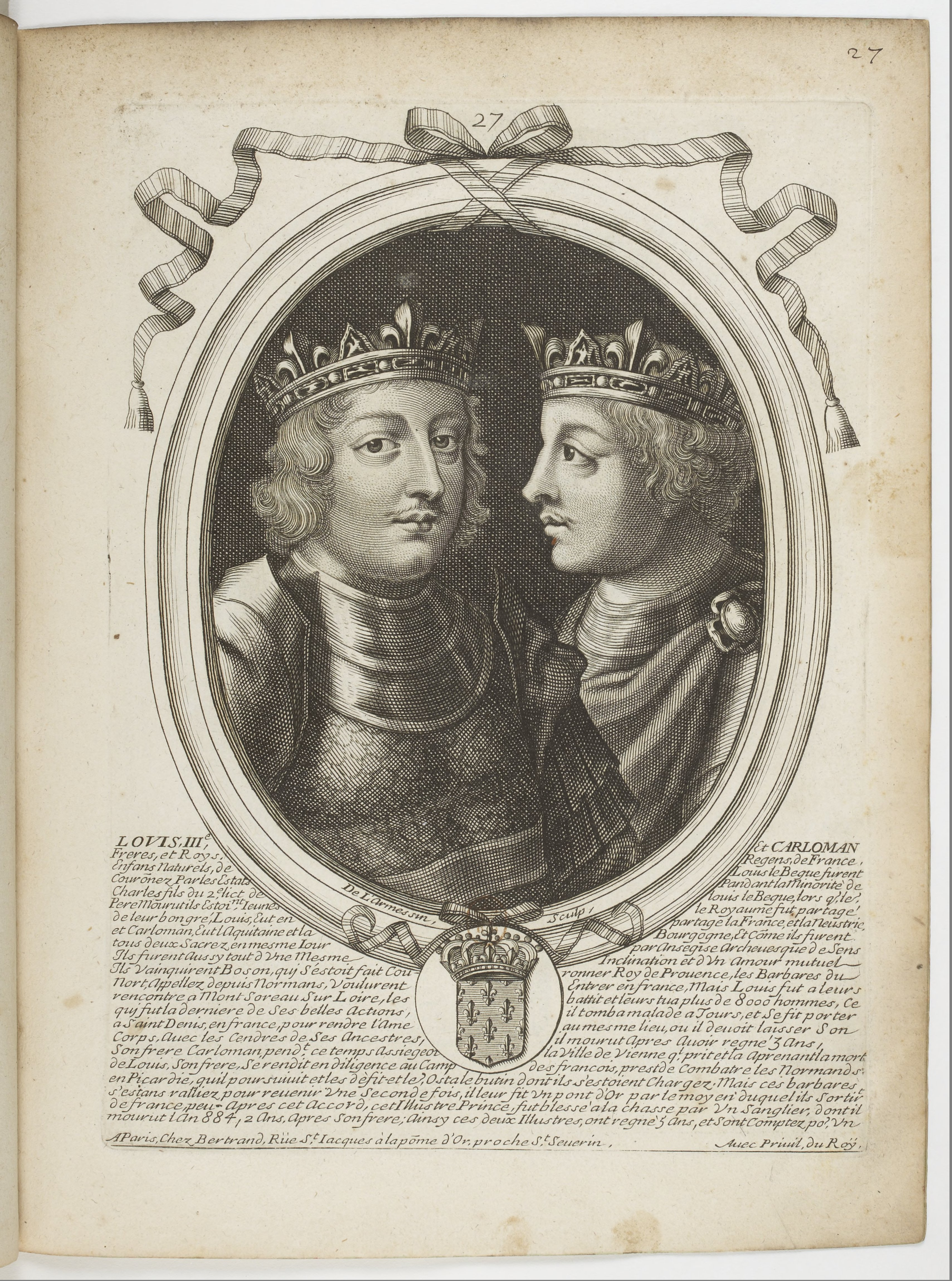 Les augustes représentations de tous les rois de France, depuis Pharamond jusqu'à Louis XIV,... avec un abrégé historique sous chacun, contenant leurs naissances, inclinations et actions plus remarquables pendant leurs règnes